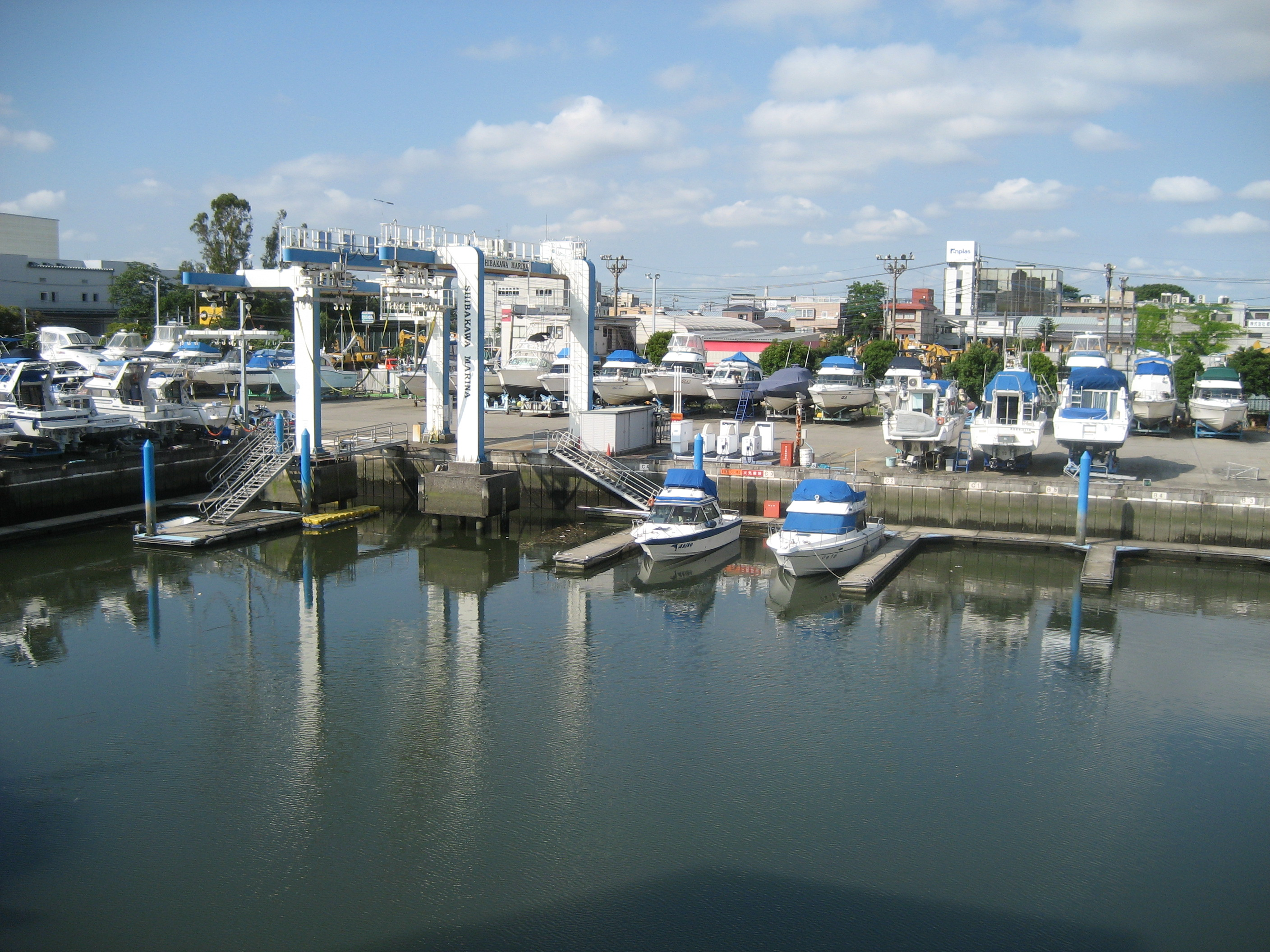 川口市にある芝川マリーナ